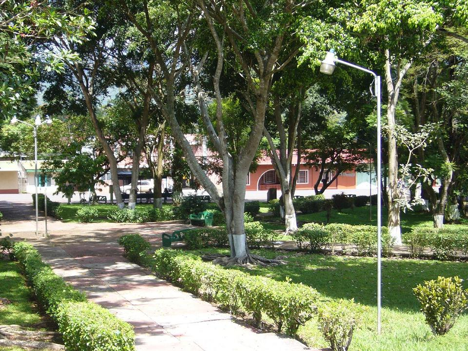 Parque, frente a la Iglesia de Zaragoza en Palmares — Alajuela Province, Costa Rica.